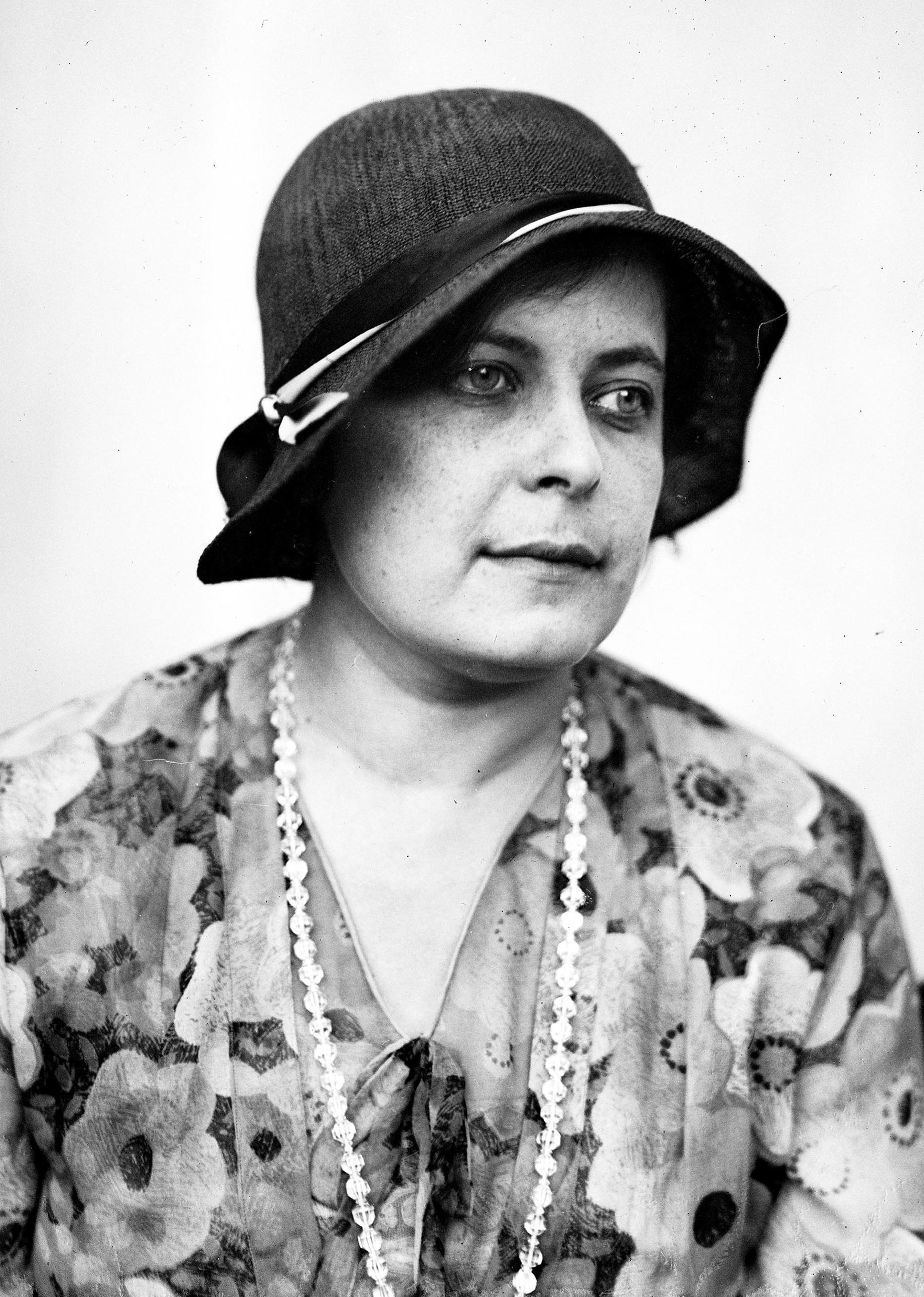 Jadwiga Zbrożek (Jadwiga Zbrożkówna). Fotografia portretowa w kapeluszu.